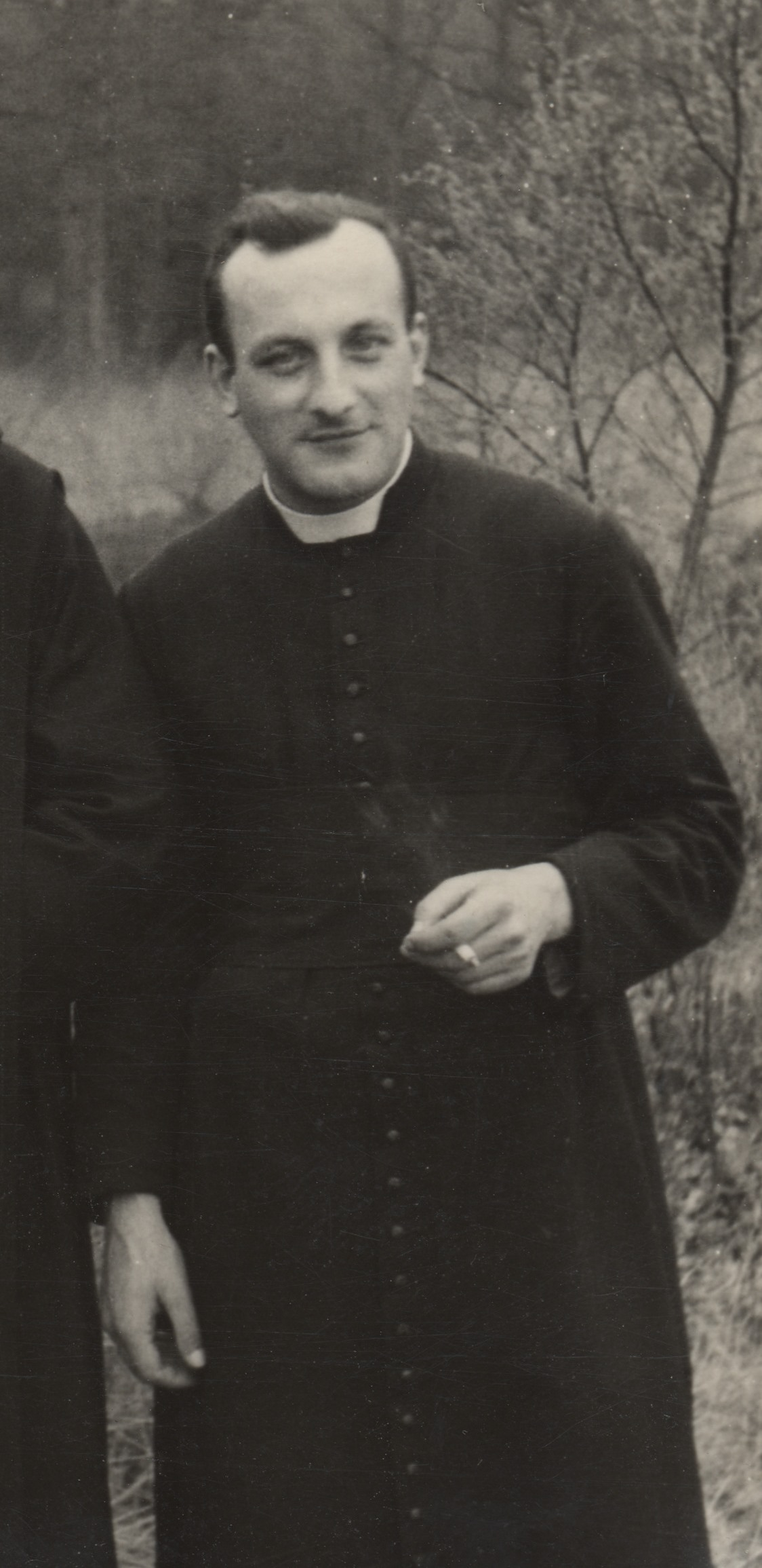 Anton Van Wilderode (pseudoniem van Cyriel Paul Coupé), ca. 1938